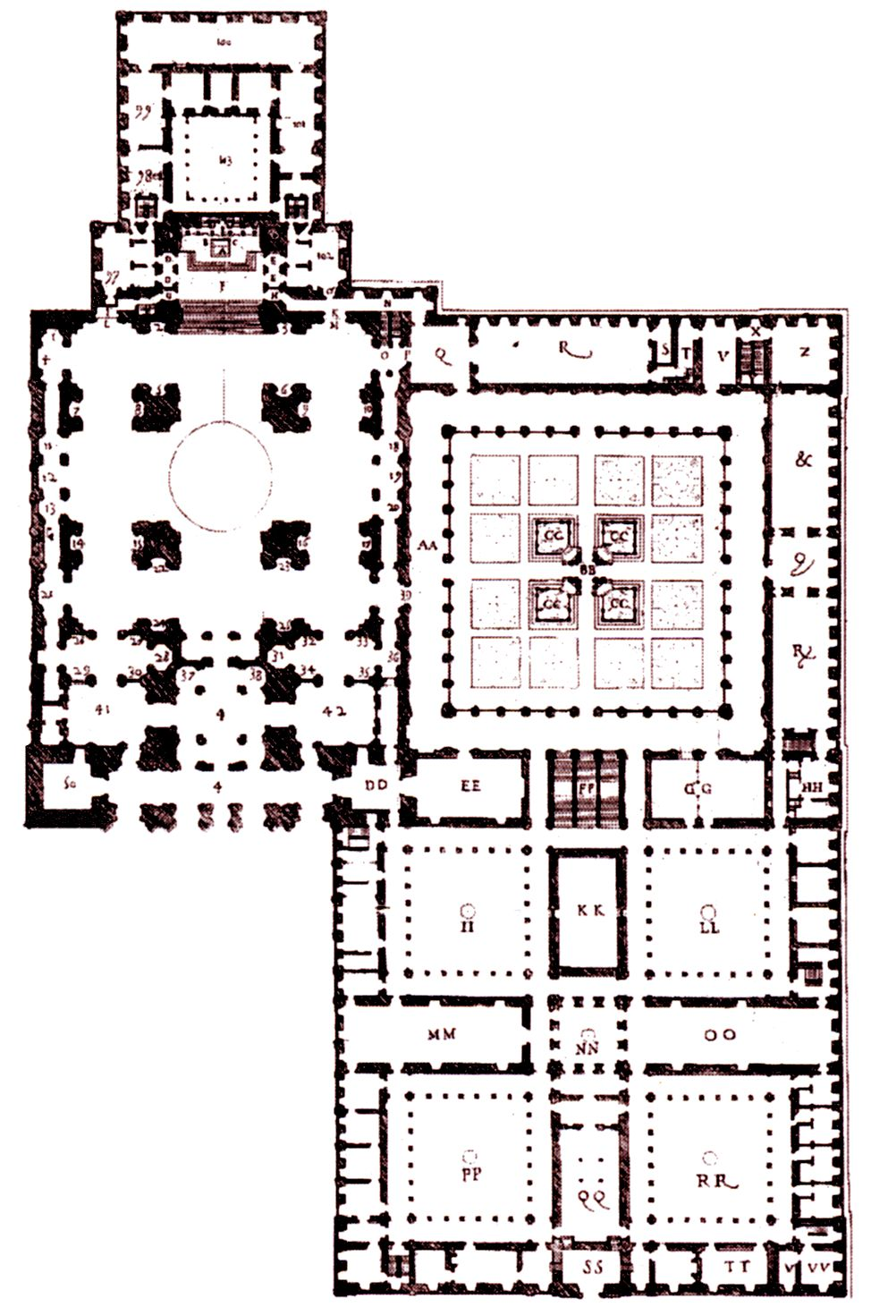 «Traza Universal» según el diseño de Juan Bautista de Toledo del Monasterio de El Escorial